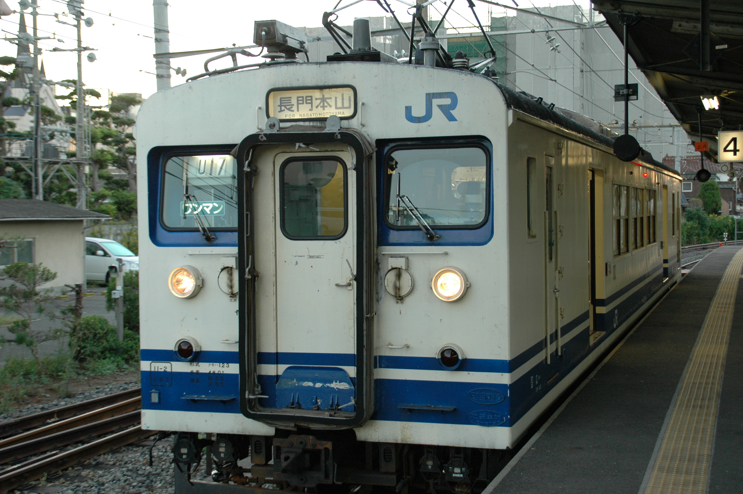 JR-WEST(JAPAN) Onoda Line, 123